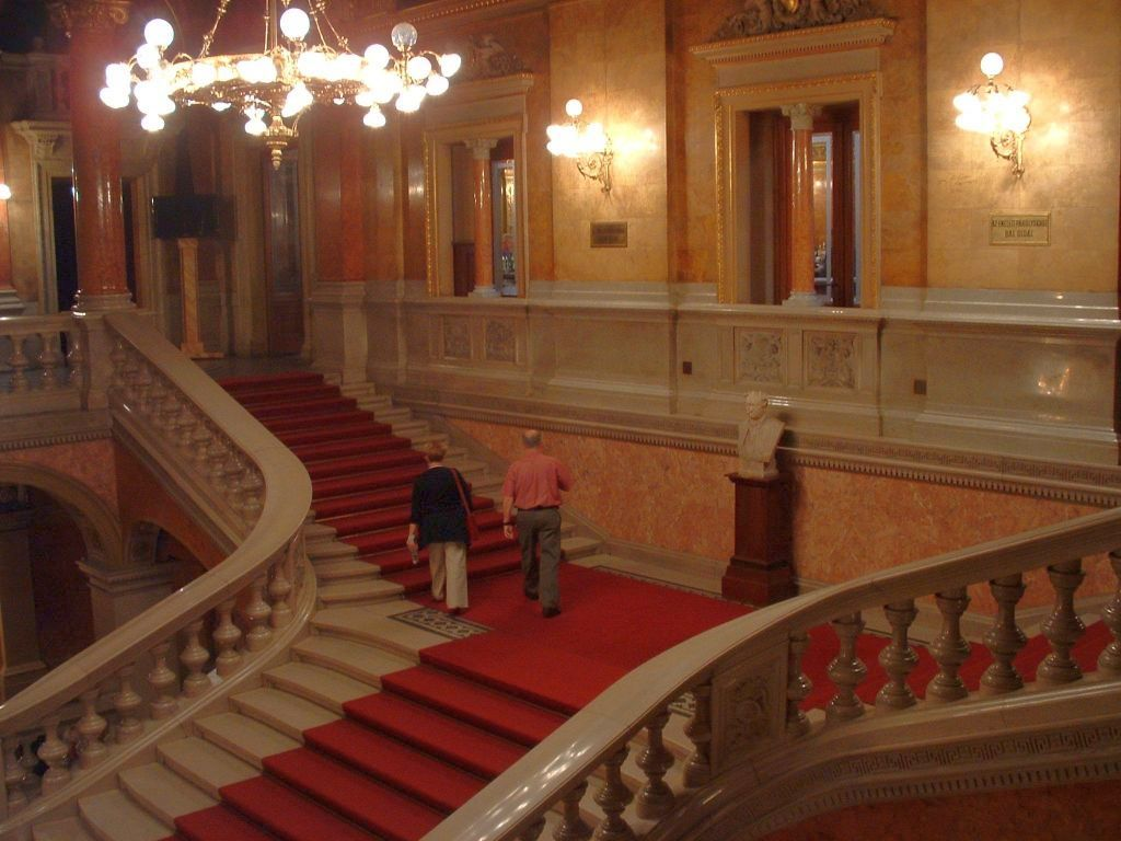 A Magyar Állami Operaház lépcsőháza